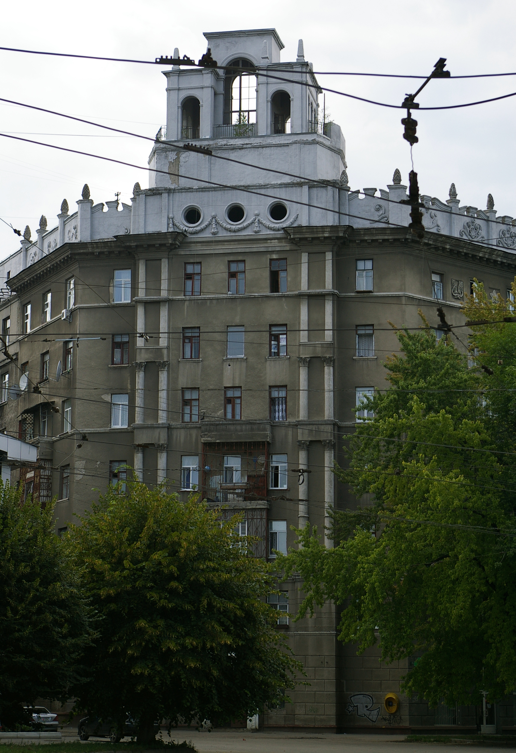 Харьков